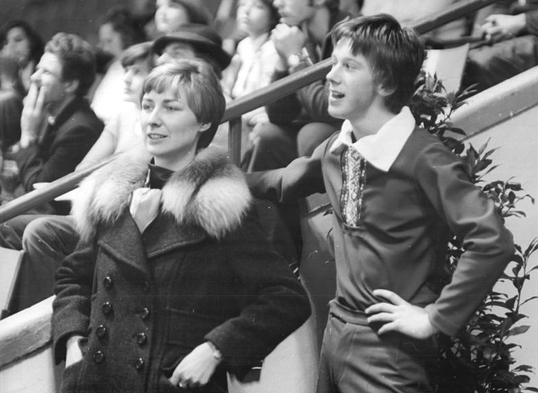 Brigitte Zeller, Mario Liebers ADN-ZB Reiche 20.11.76 Berlin: Pokal der Blauen Schwerter im Eiskunstlauf. In der Herrenkonkurrenz belegte der Berliner Dynamo-Läufer Mario Liebers am 19.11.76 den zweiten Platz. Zwar stellte er sich mit einer erstaunlich guten Kürleistung vor, die drei Dreifachsprünge und drei Doppelaxel enthielt, doch konnte der Sieger aus der UdSSR, Konstanton Kokora, seinen Vorsprung aus der Pflicht mit Erfolg verteidigen. Links im Foto Trainerin Brigitte Zeller (SC Dynamo Berlin).